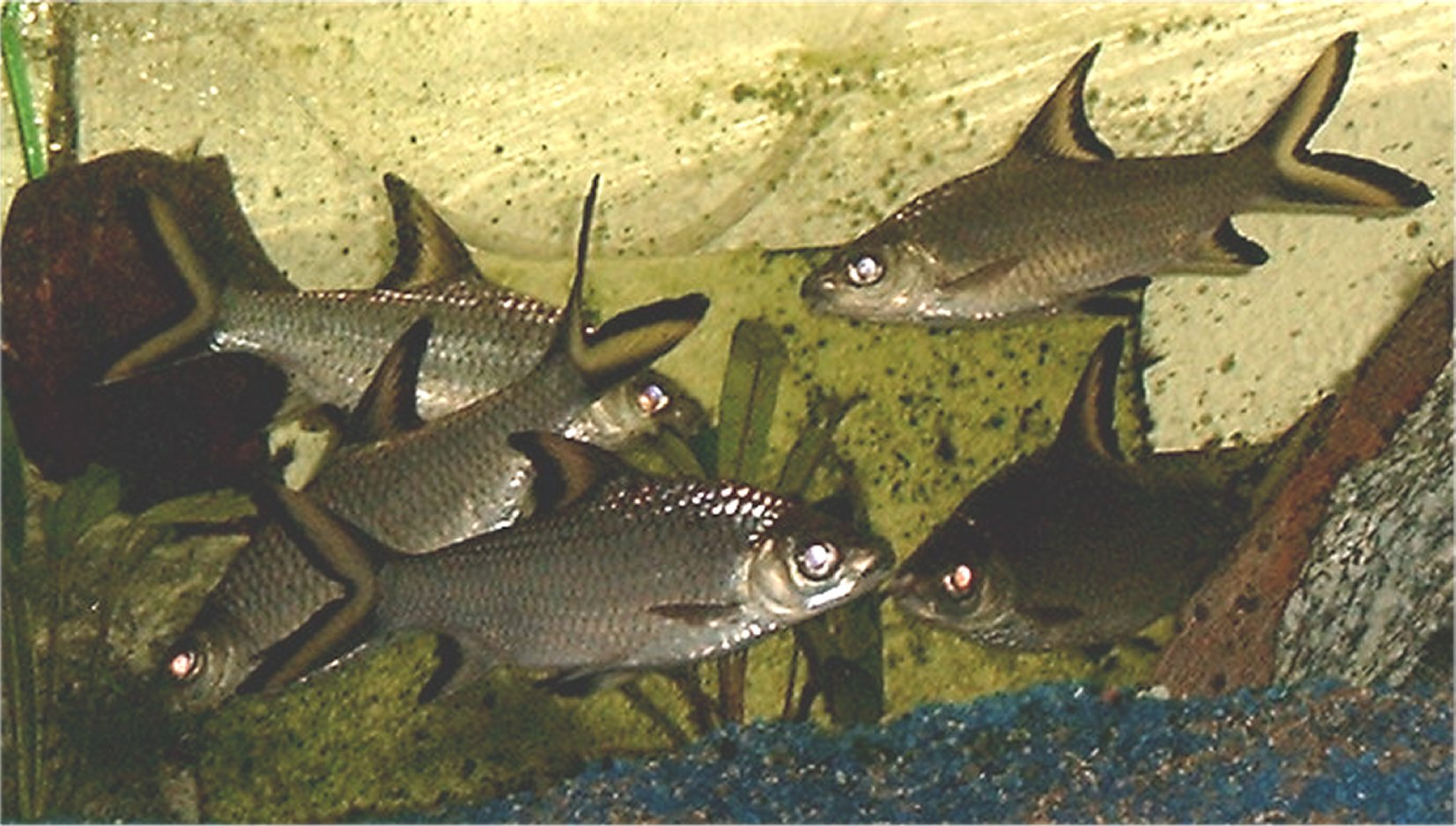 Haibarbe (Balantiocheilos melanopterus), 5 Haibarben 15 cm lang im Quarantäne-Becken